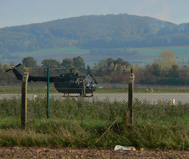 Bundeswehr-Hubschrauber MBB BO-105 auf dem Flugplatz Fritzlar, September 2008